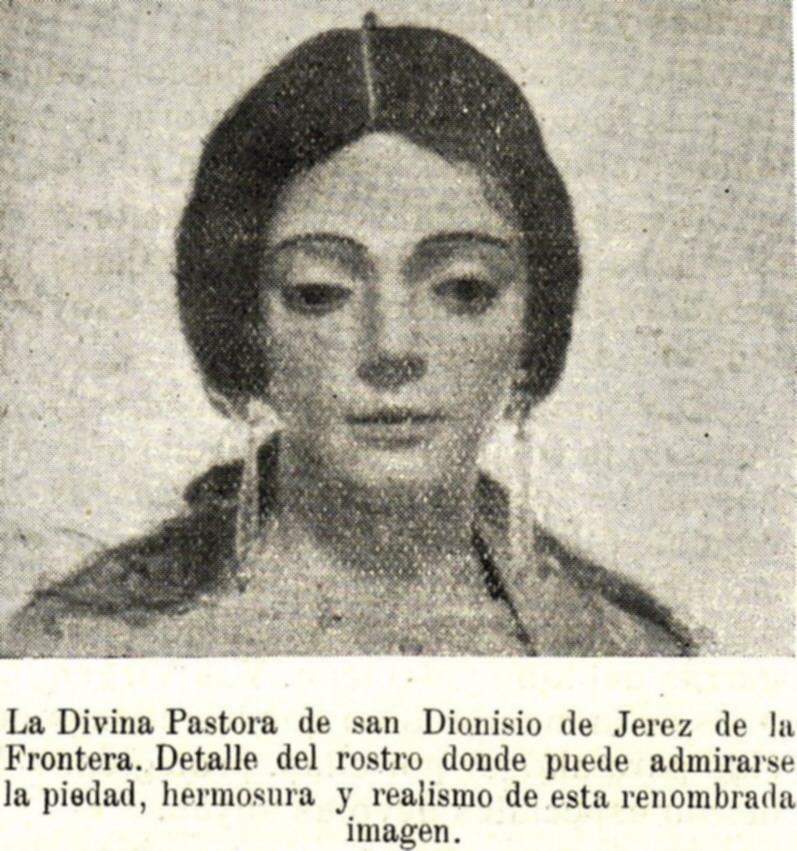 Aspecto de la Divina Pastora